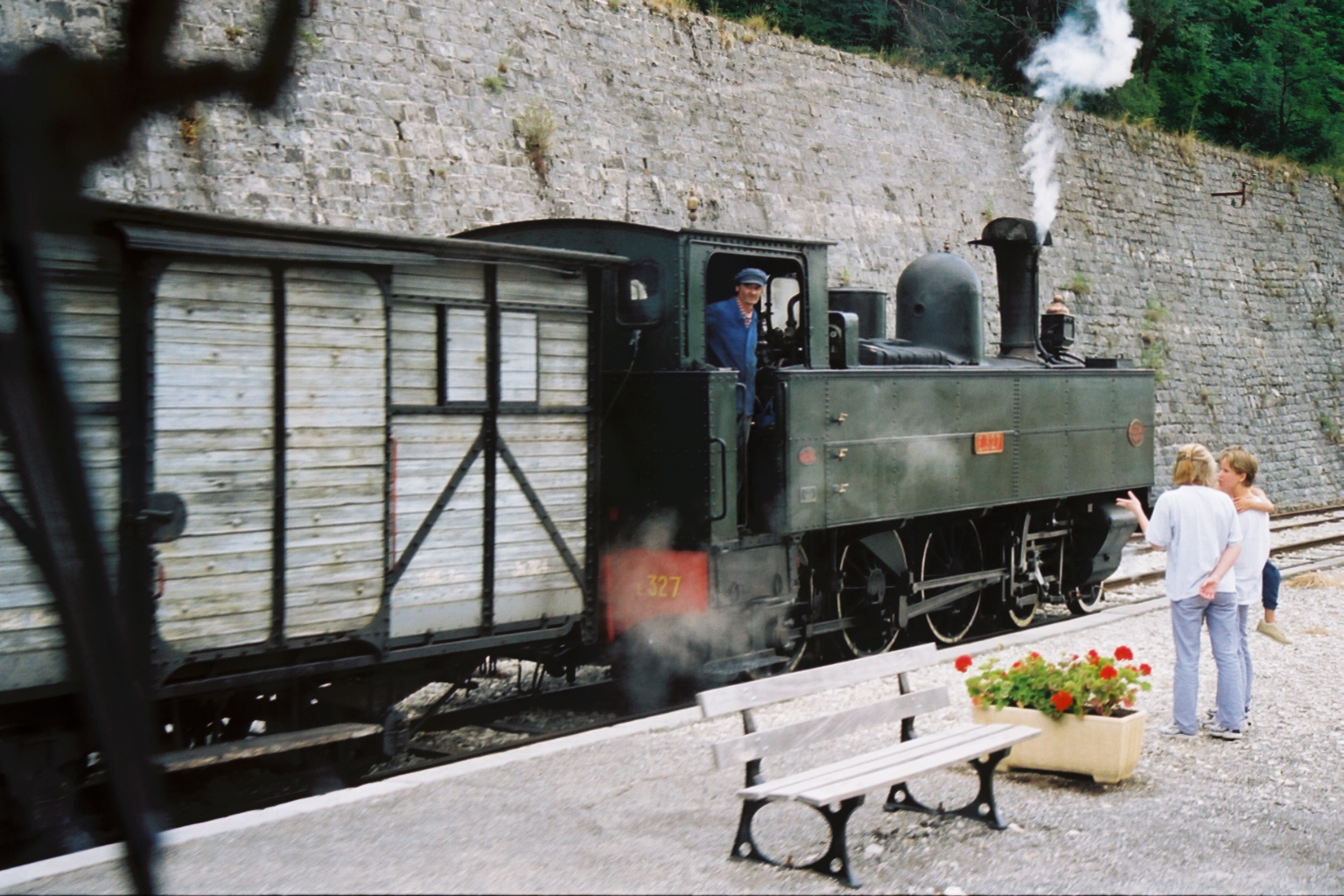 2'C Tenderlokomotive von Fives-Lille Nummer E 327 vor dem Train des pignes auf der Chemins de Fer du Provance (CP).